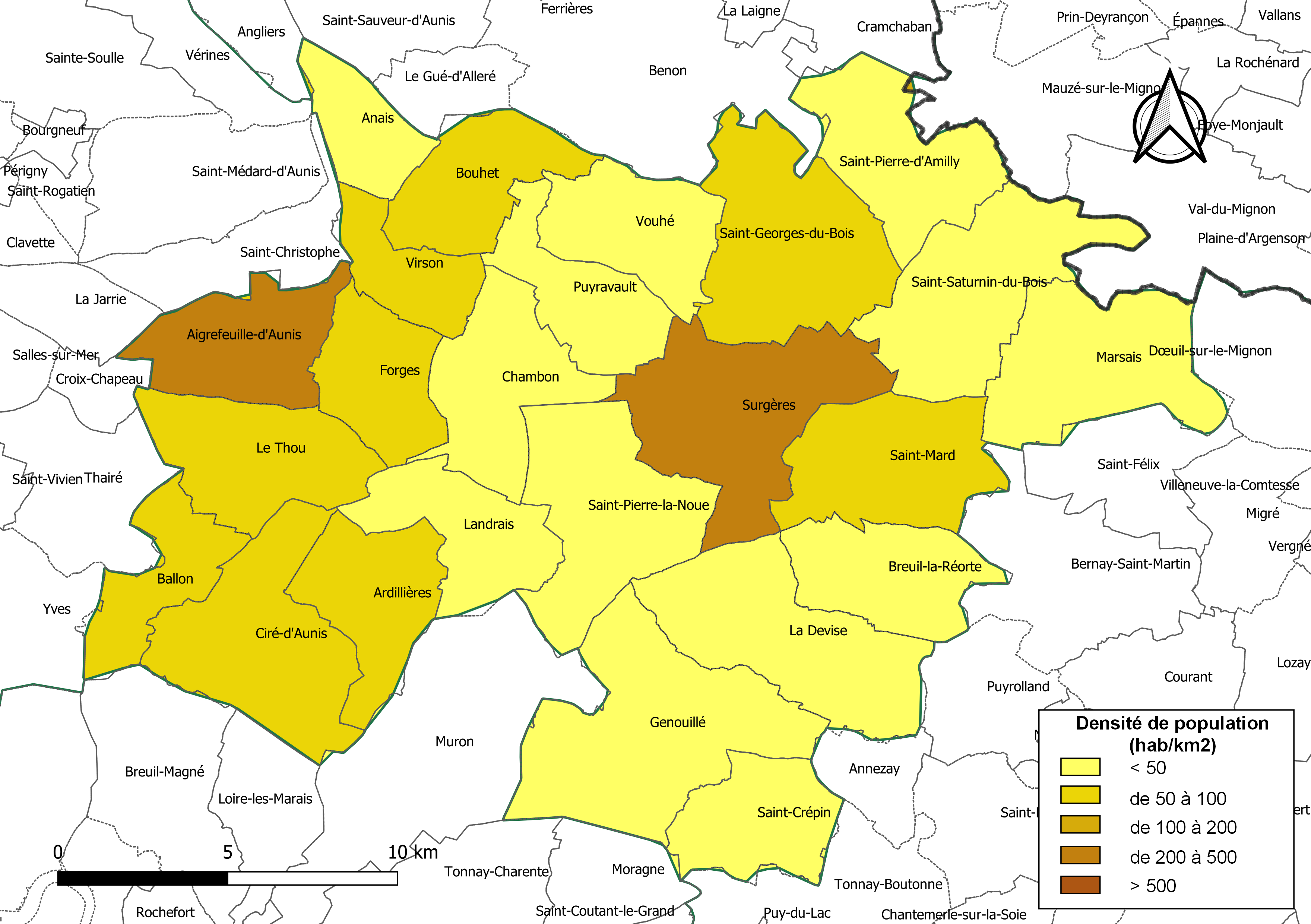 Carte des densités de population (millésimée 2016) des communes de la communauté de communes la Communauté de communes Aunis Sud, département de la Charente-Maritime, France. Composition au 1er janvier 2019.